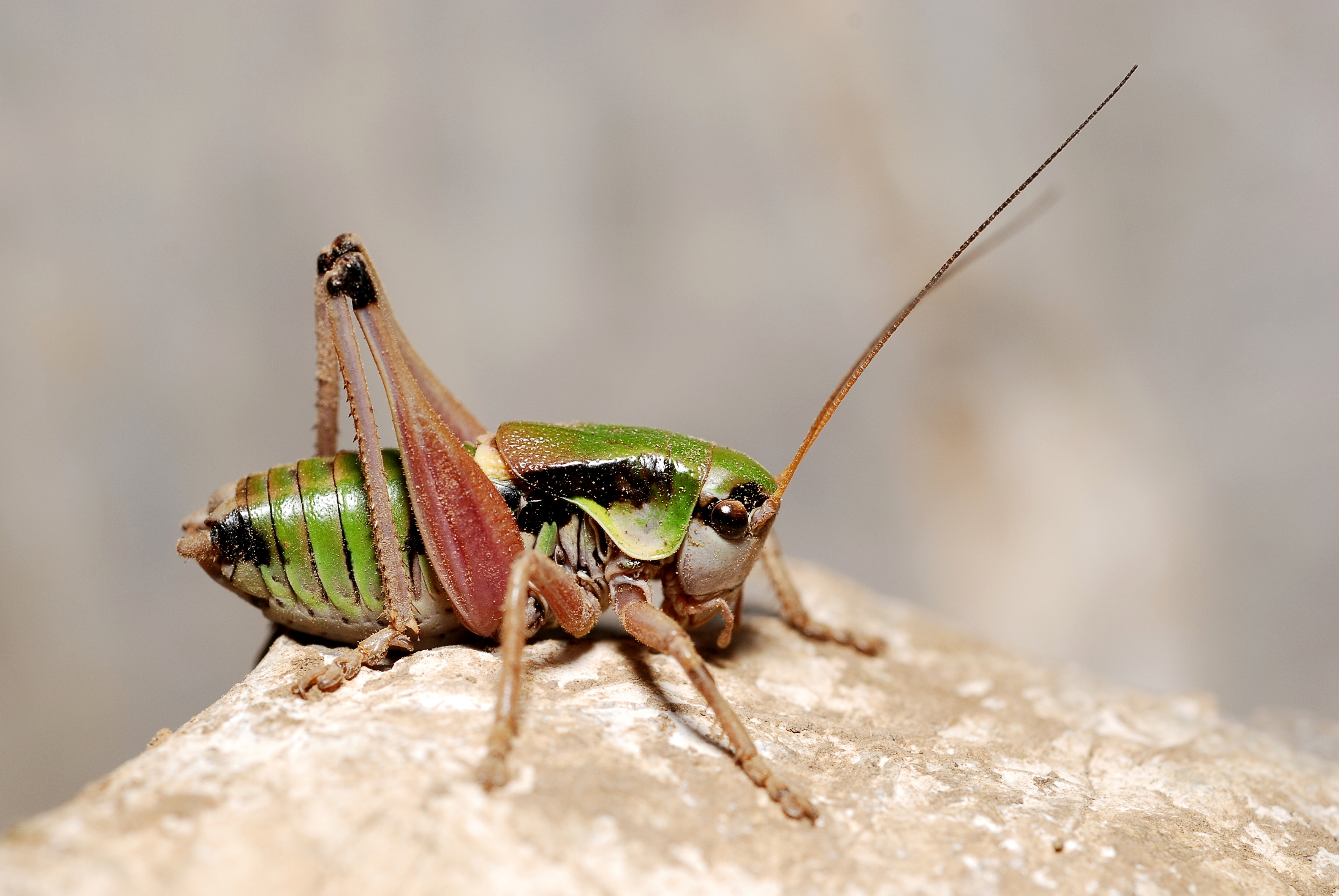 Anonconotus alpestris male